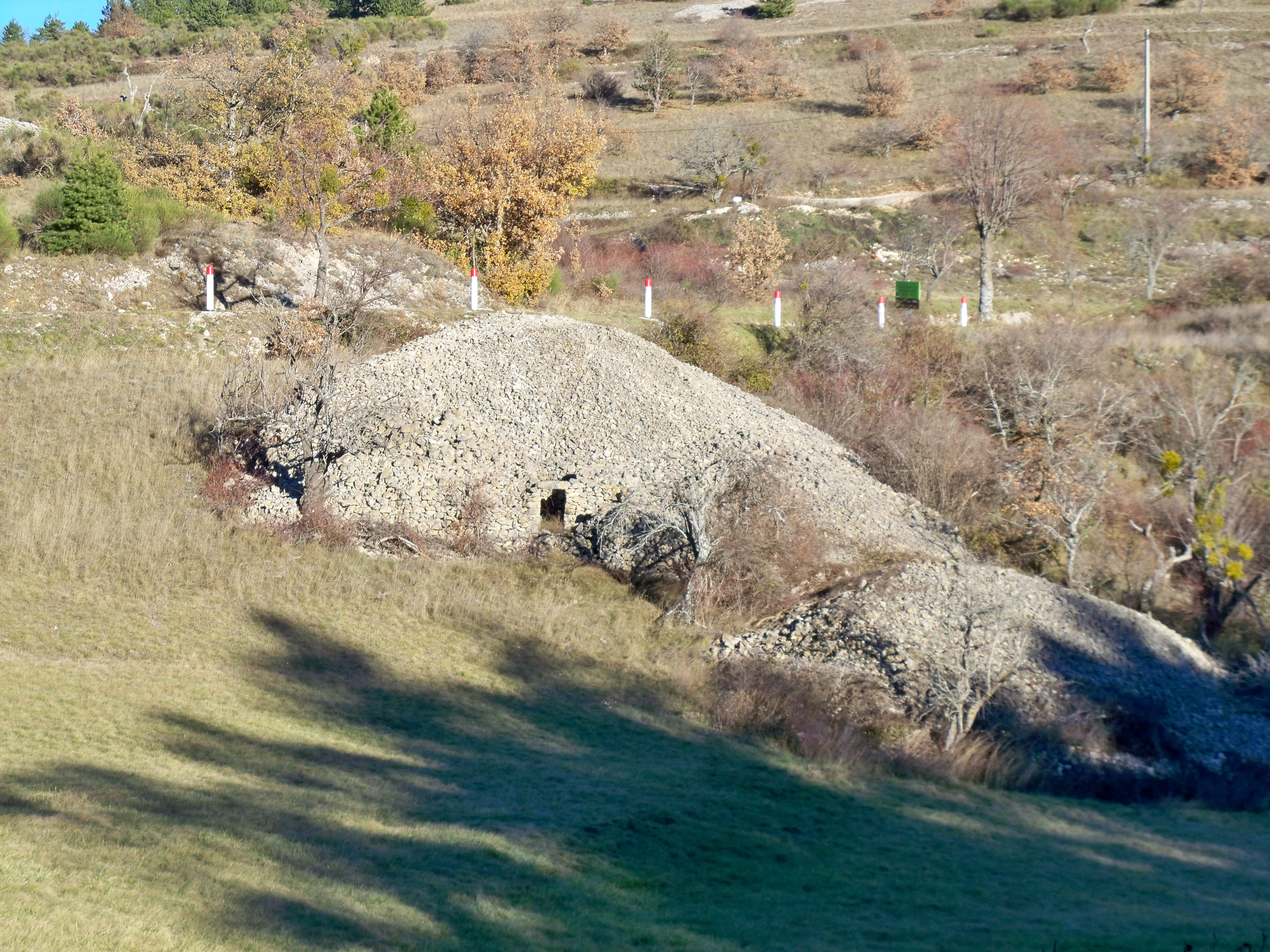 Clapas à Aurel (Vaucluse)